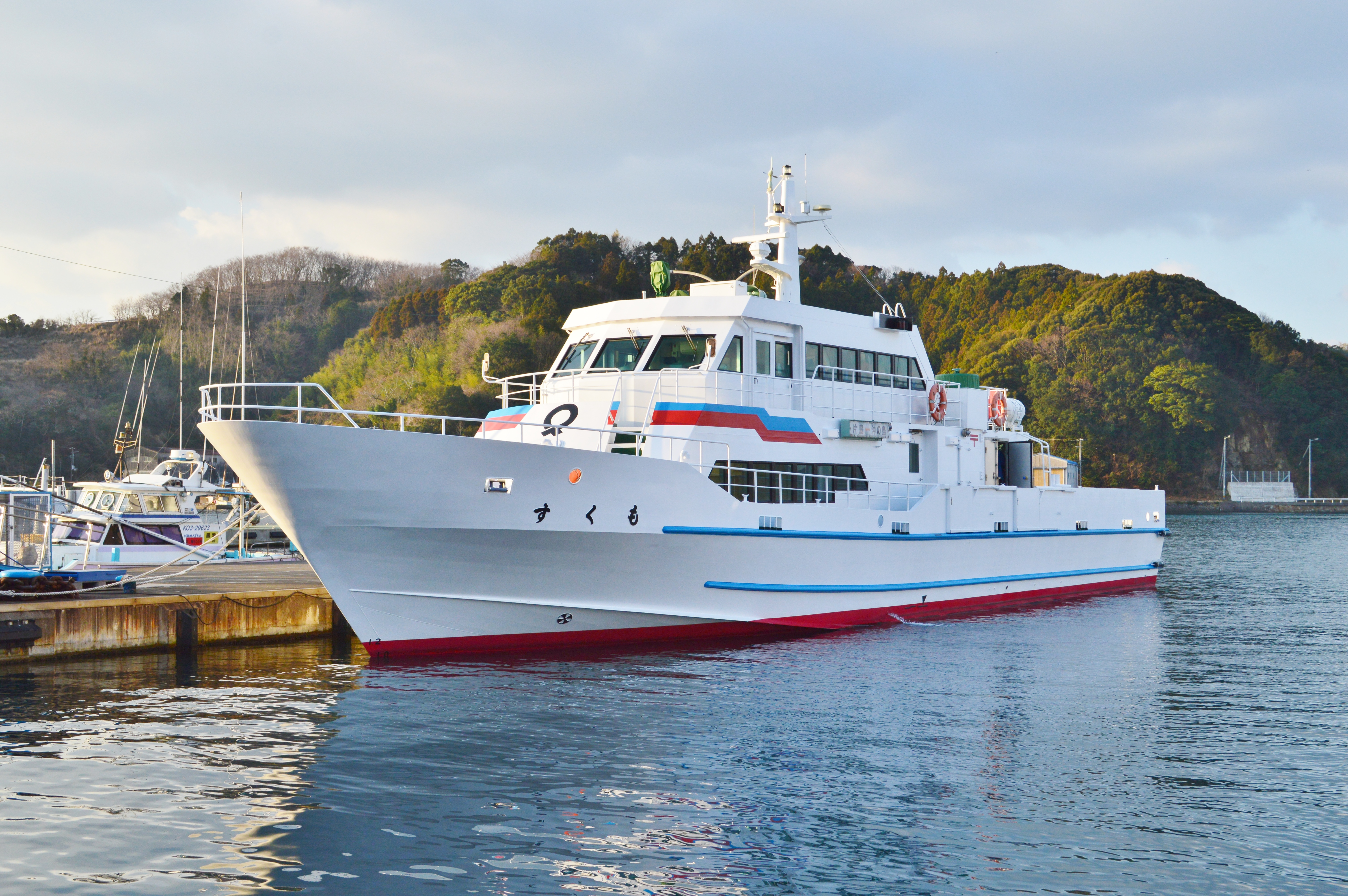 宿毛市営定期船 すくも (宿毛湾港にて)